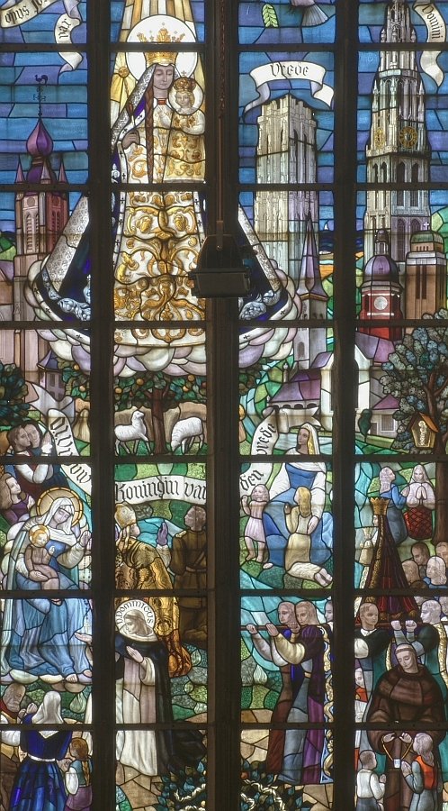 Sint-Hubertuskerk (Berchem) - Glasraam - OLV van den Vrede door J. Van den Broeck (1946)